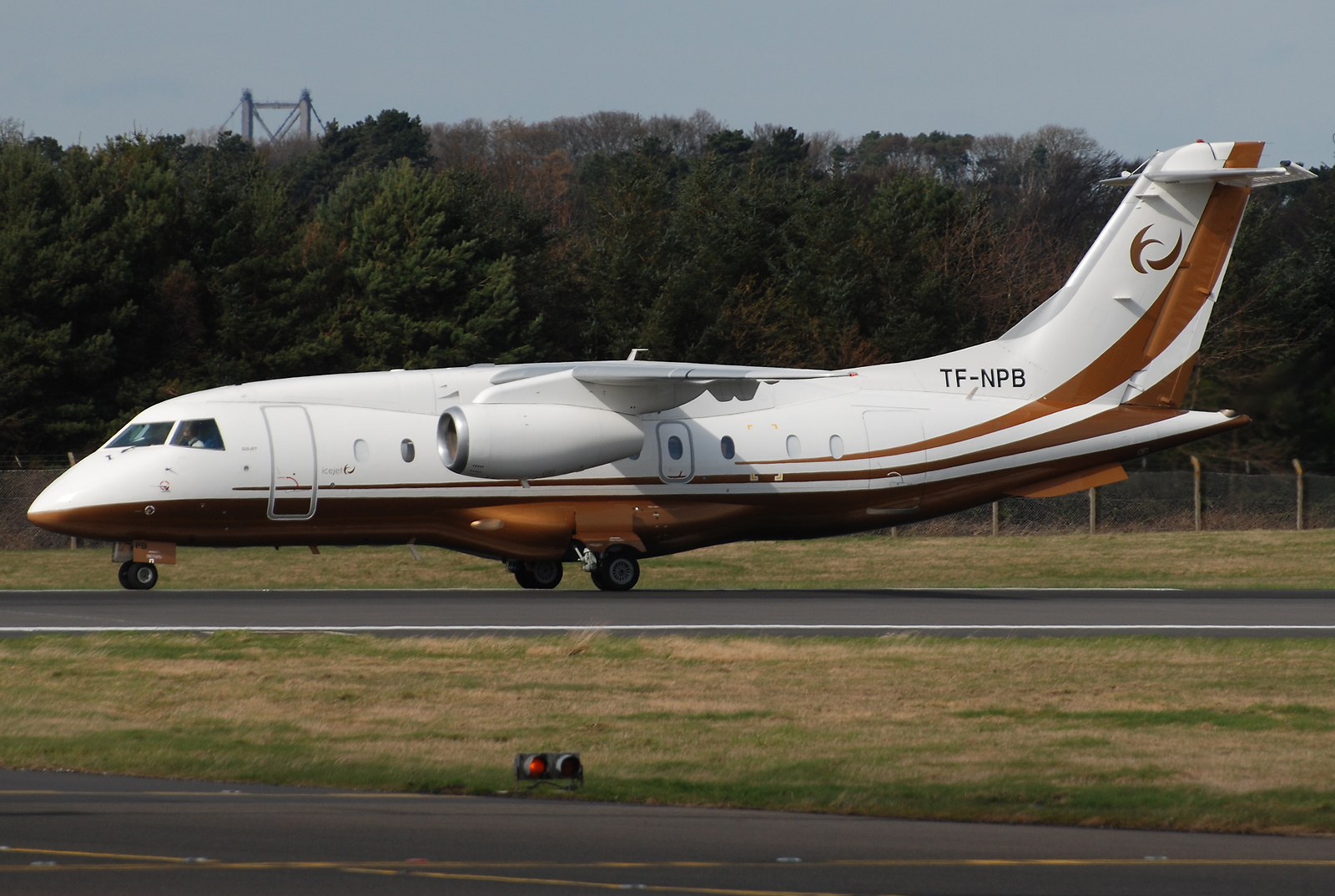 Icejet 328-300 Jet TF-NPB at Edinburg Airport